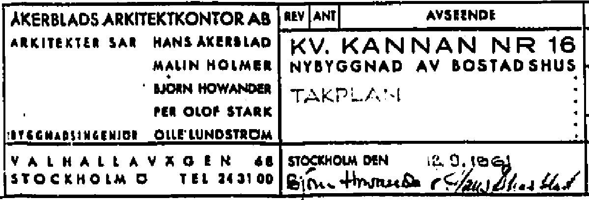 Ritningsstämpel för Åkerblads arkitektkontor